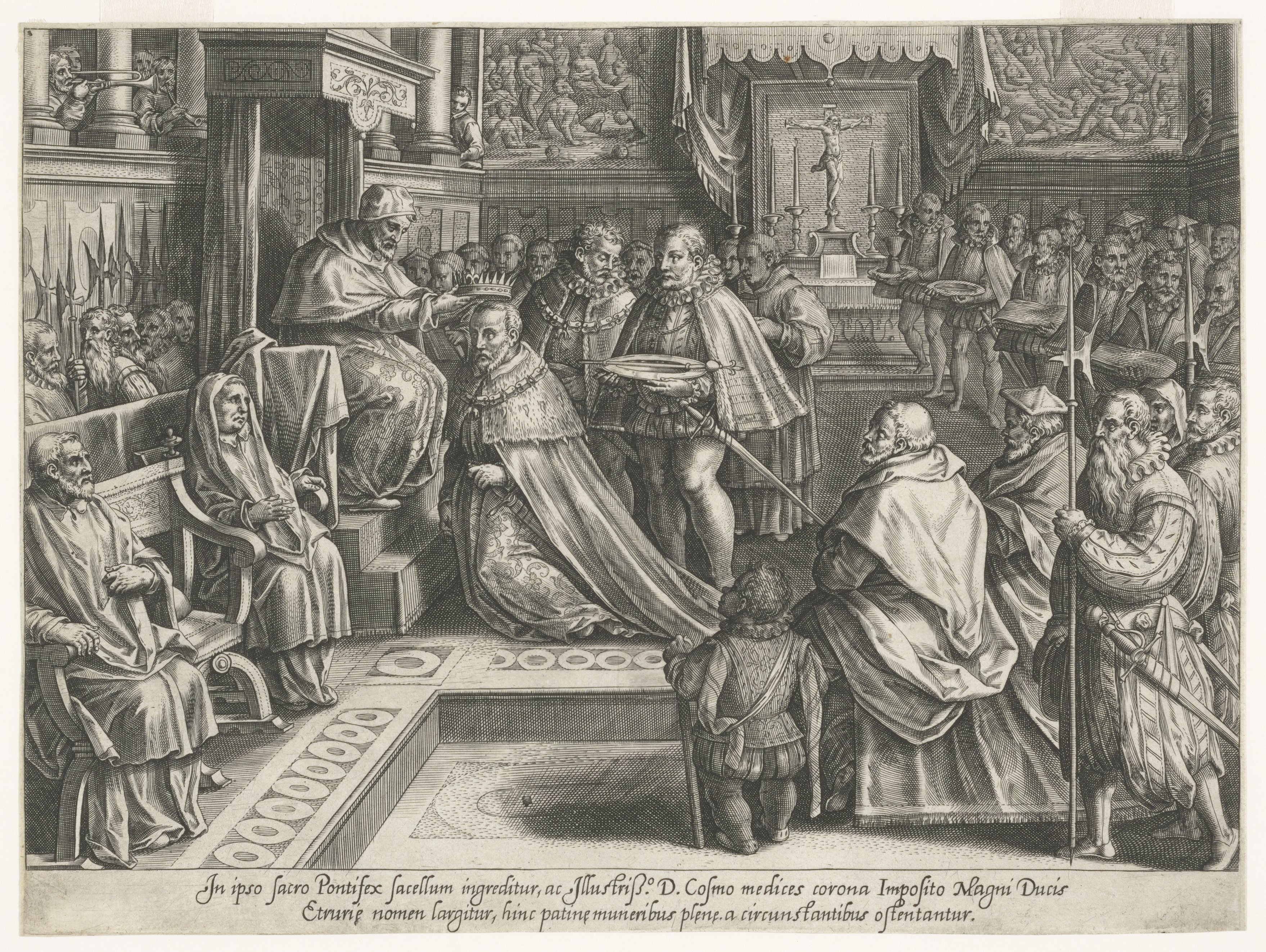 CollectieVoorhelm SchneevoogtInventarisnummerNL-HlmNHA_53008271BeschrijvingIn de Sixtijnse kapel wordt Cosimo De' Medici in 1569 door Pius V gekroond tot groothertog van Toscane. Op de achtergrond het Laatste oordeel van Michelangelo.Twintigste prent uit een serie eenentwintig prenten over de familiegeschiedenis van het geslacht De' Medici, getiteld: Mediceae Familiae rerum feliciter gestarum victoriae et triumphi.Gravure door Philips Galle naar ontwerptekening van Jan van der Straet / Johannes Stradanus, adres verwijderd, met Latijns onderschrift.FotonummerNL-HlmNHA_53008271DocumenttypeHistorieprenten, tekeningen en foto'sVervaardigerGalle, Philips (1537-1612), Straet, Jan van der / Stradanus, Johannes (1523-1605) LandNederland ProvincieNoord-Holland Begindatum1582Einddatum1583Datering gebeurtenis1569TechniekGrafiek Drukwerk Afmeting hoogte (cm)22Afmeting breedte (cm)29LiteratuurNew Hollstein Dutch, Philips Galle, 502